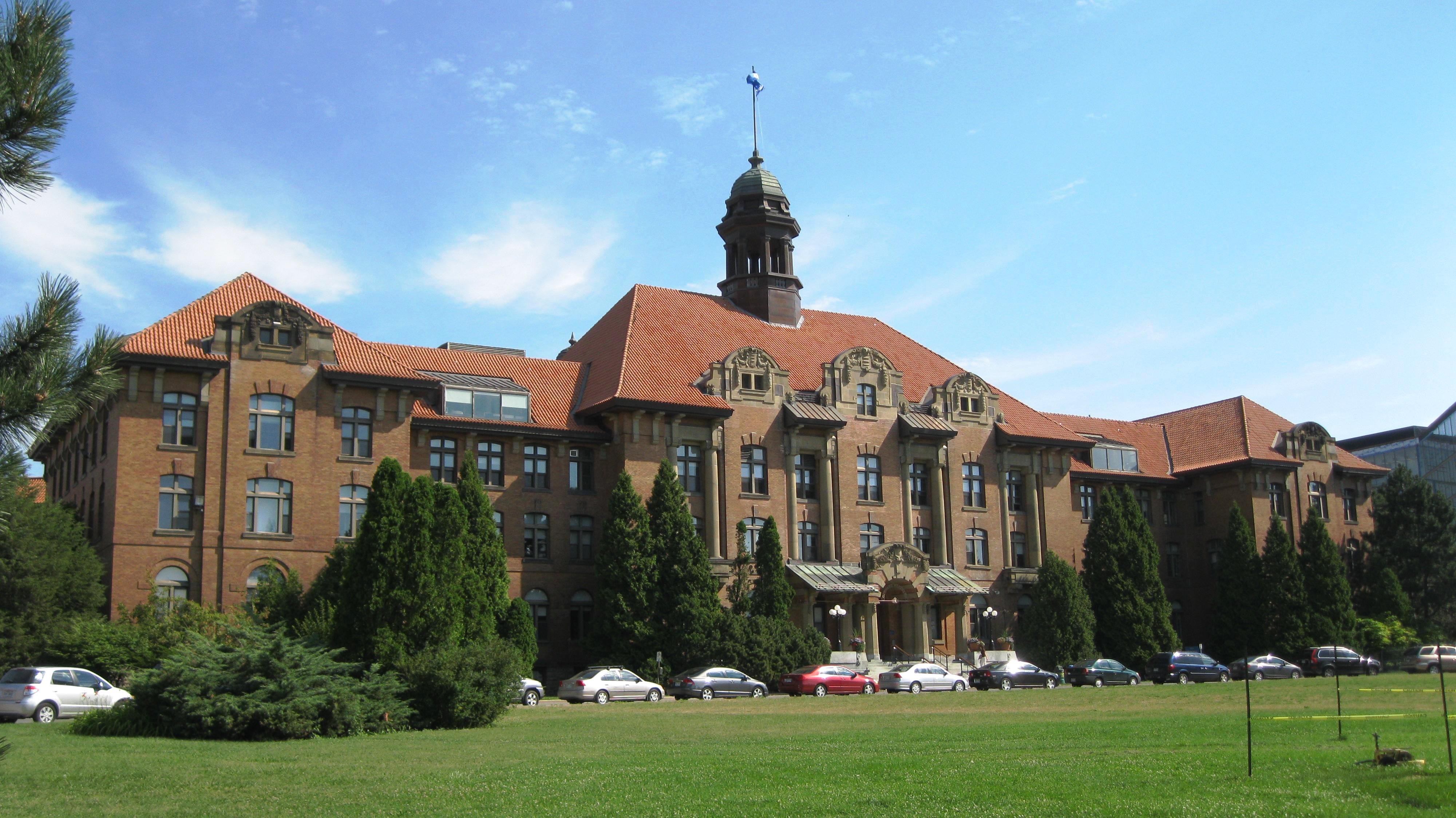 John Abbott College